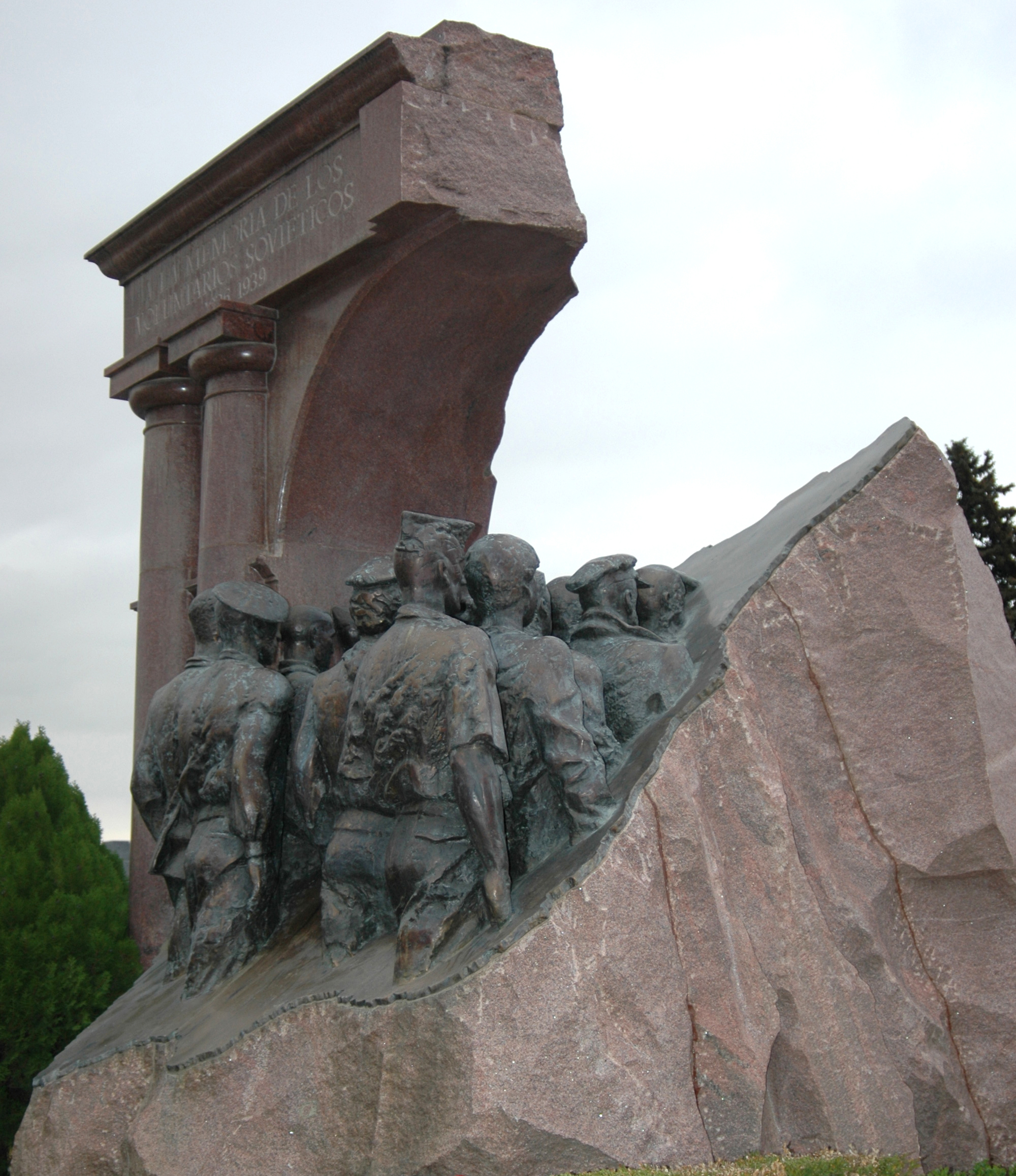 Советские добровольцы уходят в землю Испании